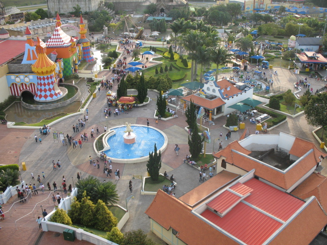 Parque temático Hopi Hari em Vinhedo, São Paulo, Brasil.